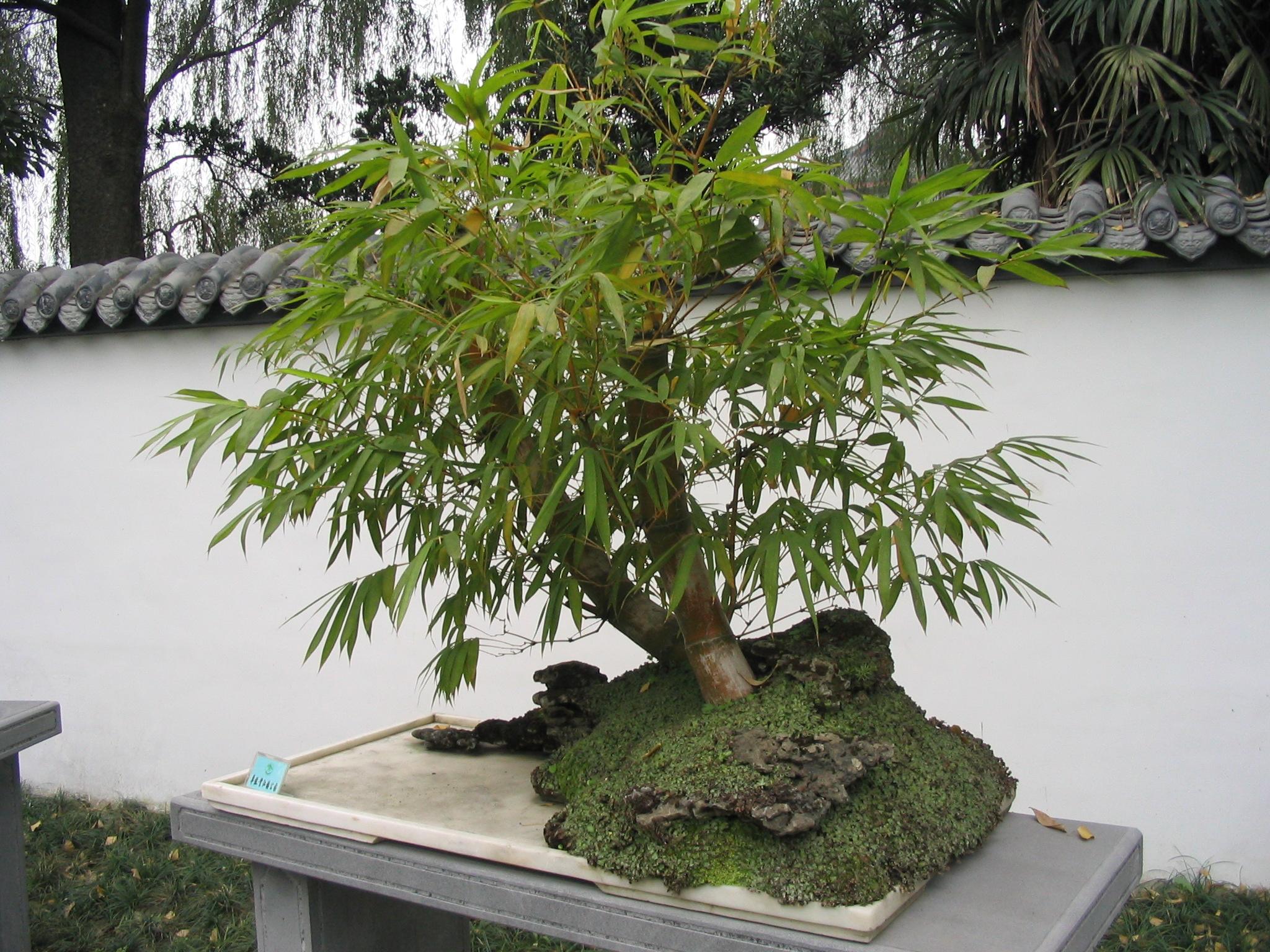 Bamboo bonsai in Baihuatan Park, Chengdu, China.